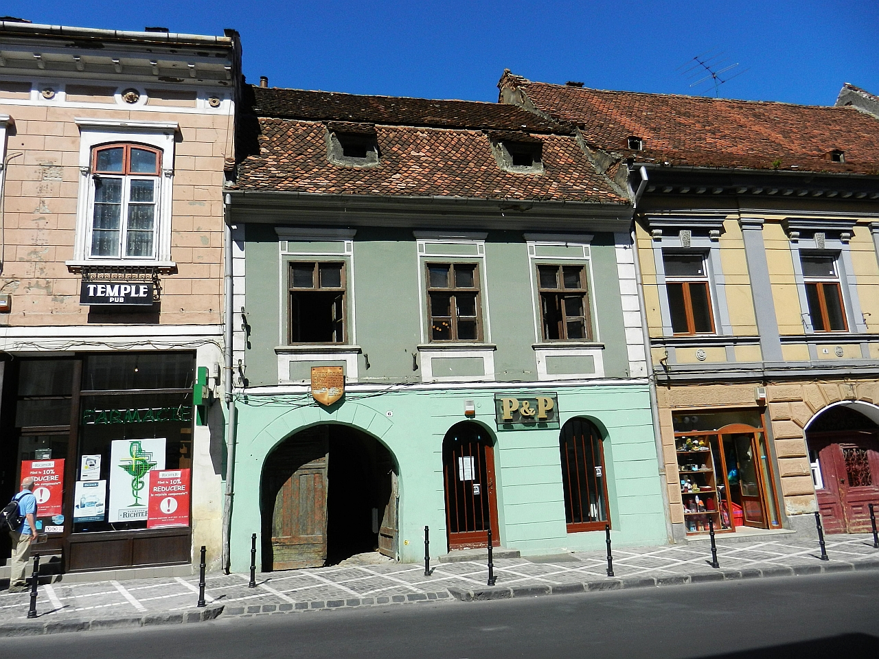 Casa Valentinus Hirscher